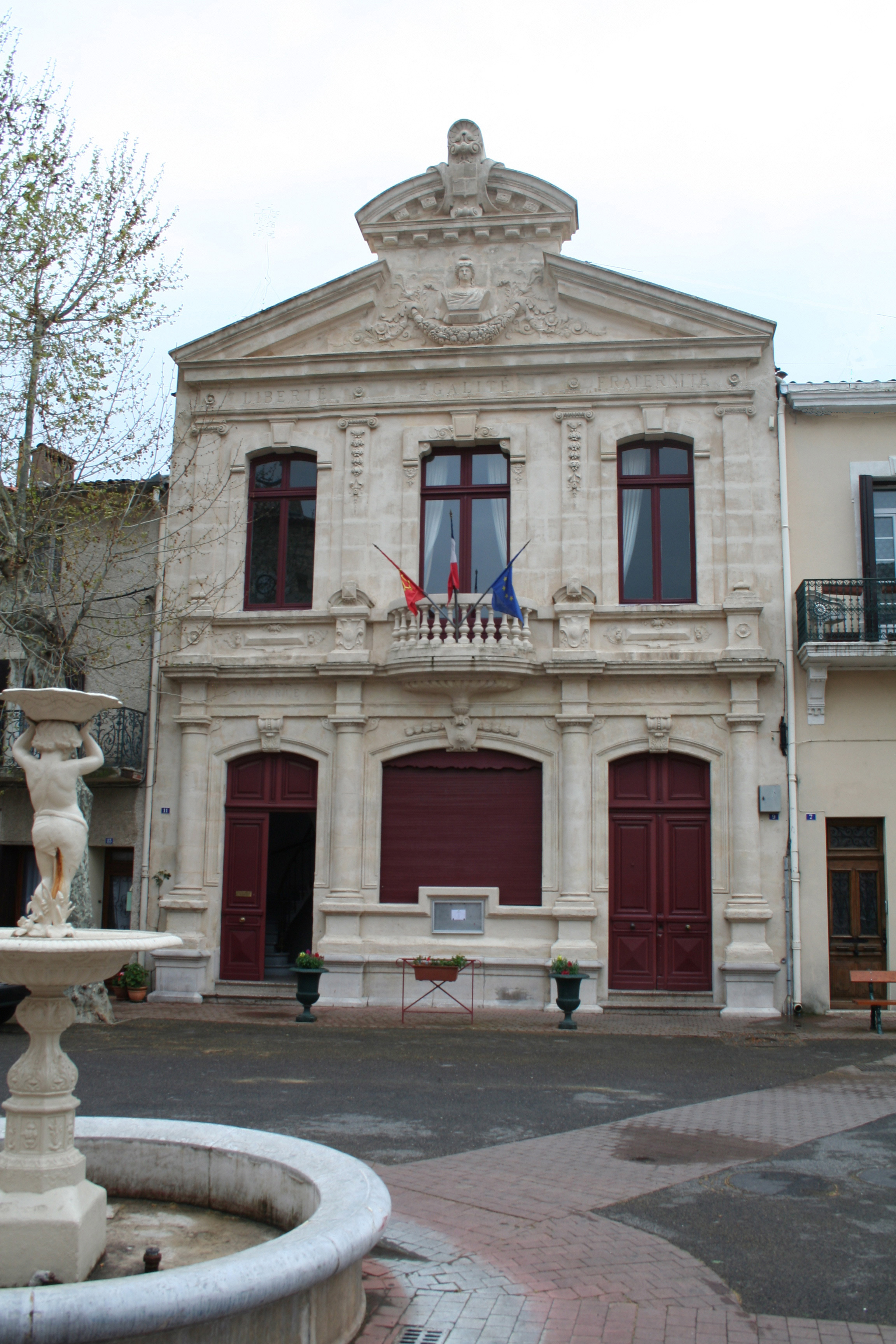 Fontès (Hérault) - Mairie.